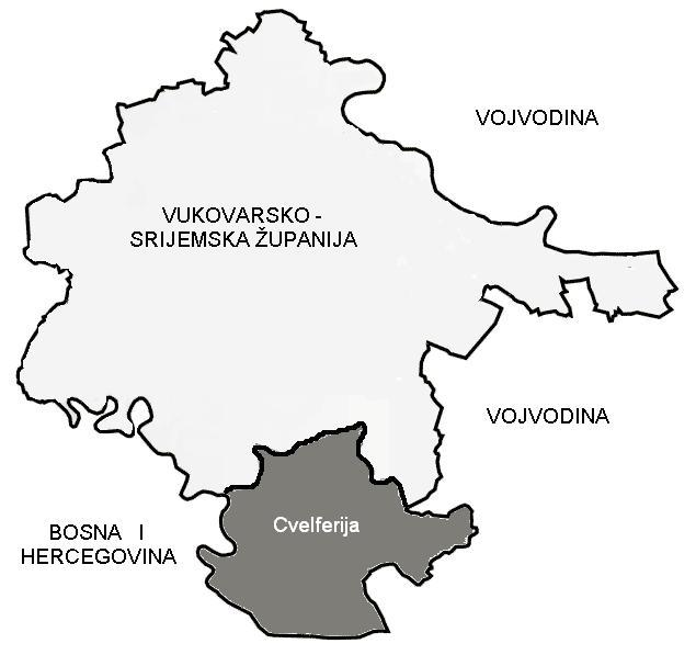 Cvelferija